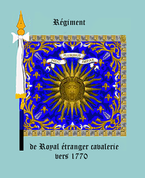 Standarte des Kavallerieregiments „Royal étranger“ Königreich Frankreich (bis 1770)